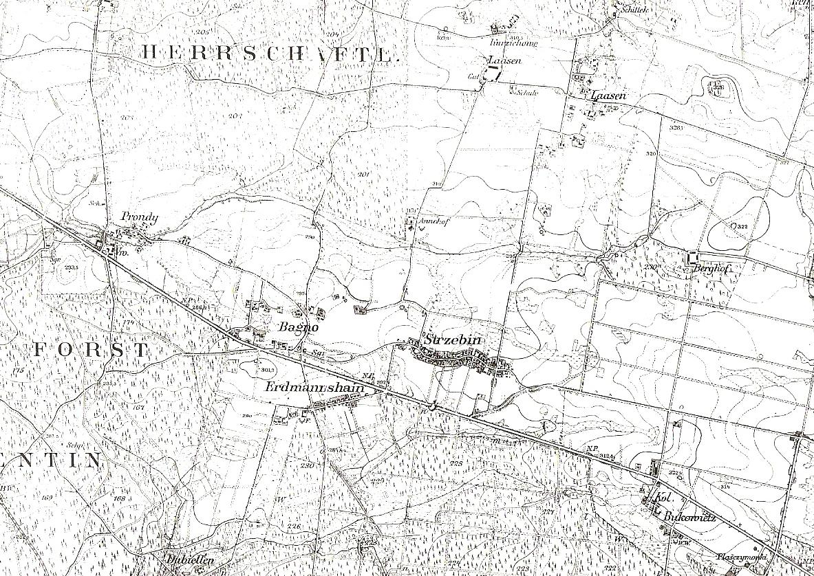 Mapa konturowa Gminy Strzebiń ok.1840 r.